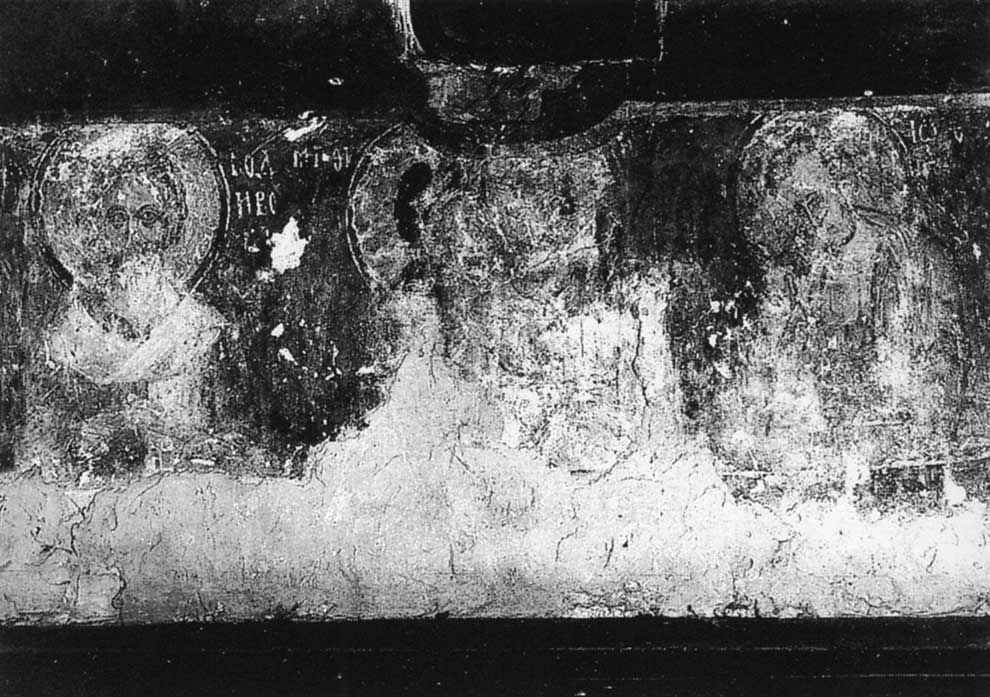 Сцэна "Не рыдай Мене, Мати" са святымі Радзівонам і Іаанам Багасловам па баках. Фрэска Благавешчанскай царквы на Рурыкавым Гарадзішчы ў Ноўгарадзе. XIV ст.